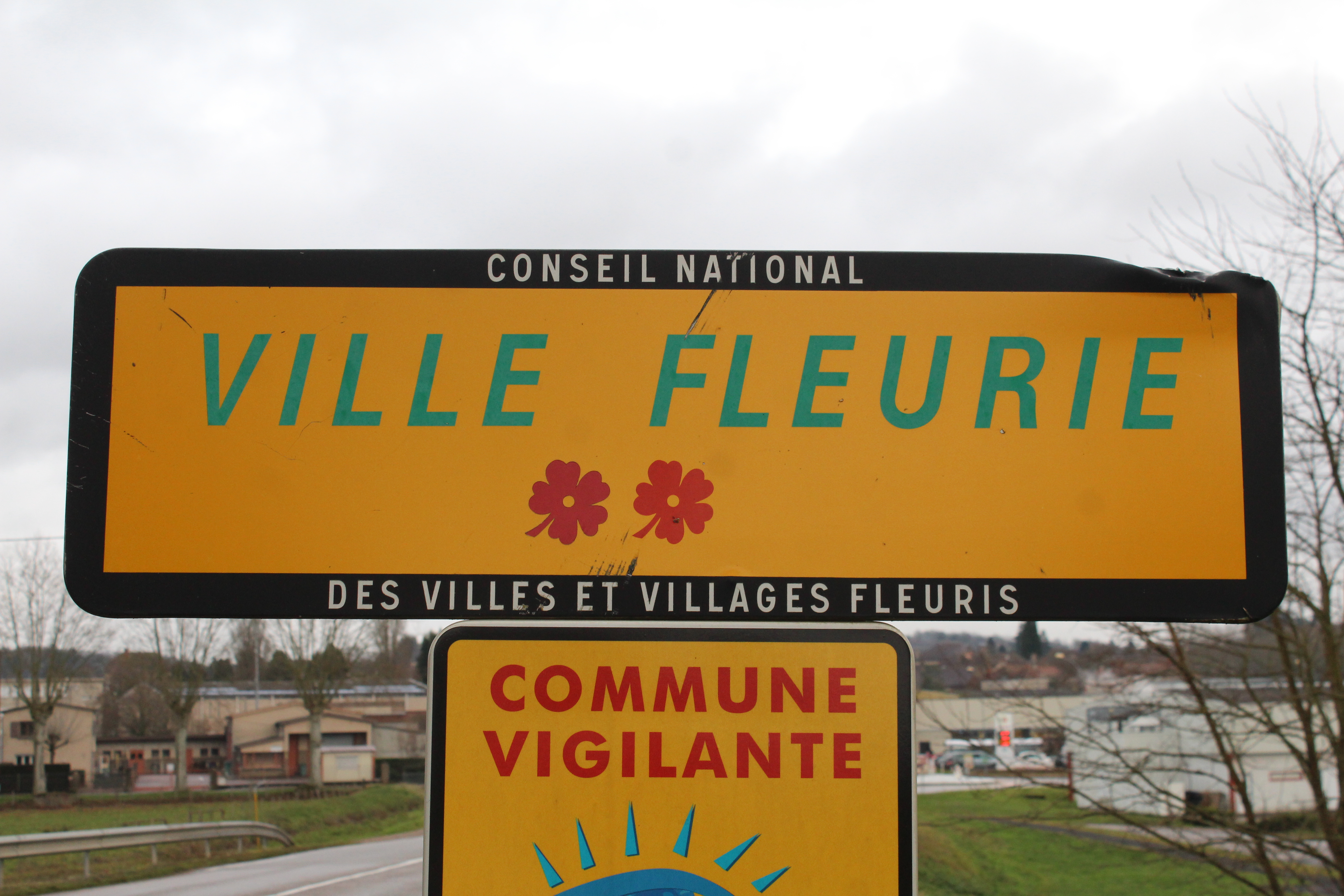 Panneau "Ville fleurie" avec deux fleurs à Marcigny.